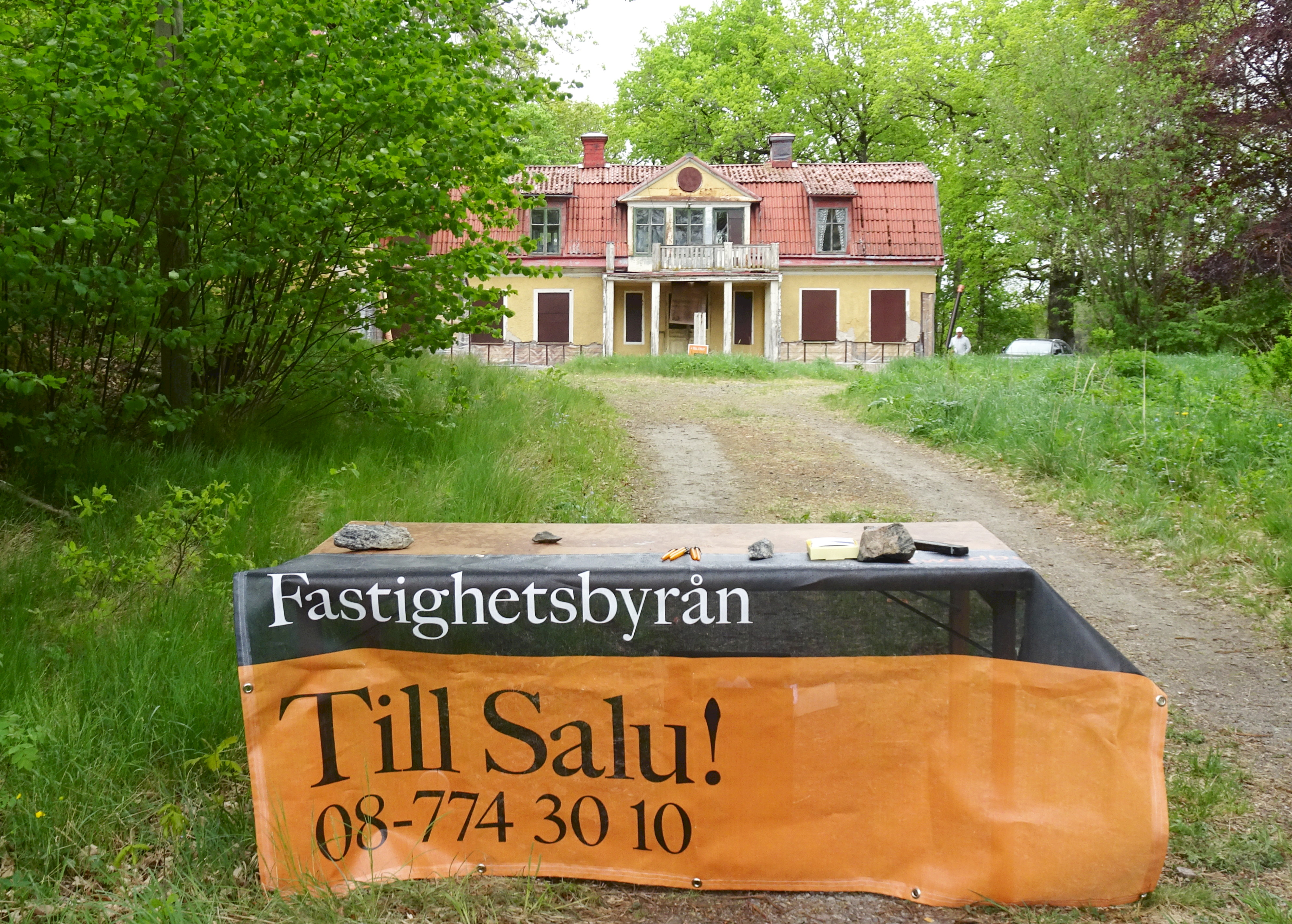 Björksättra gård till salu maj 2017, mäklare är Swedbank Fastighetsbyrå AB